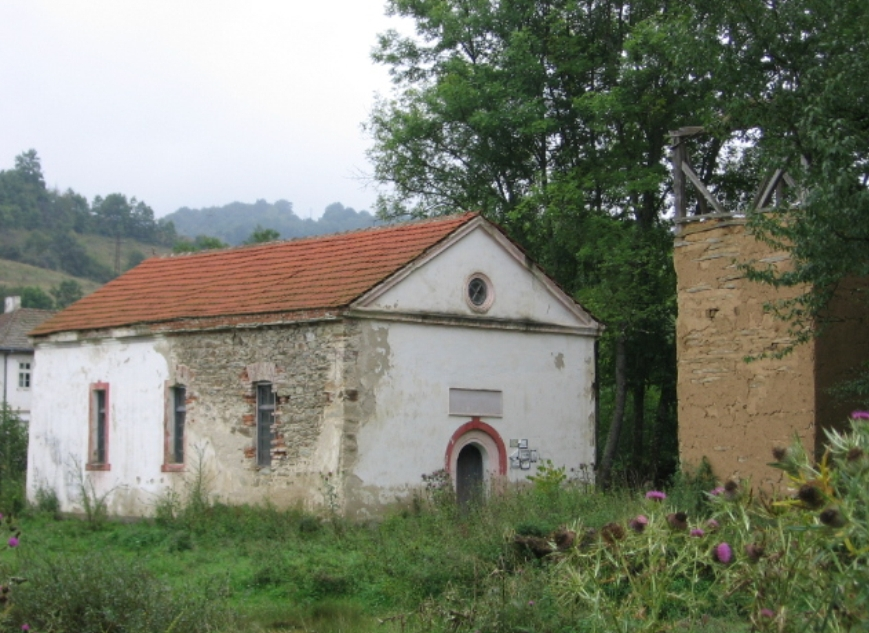 Црква у Кострошевцима.